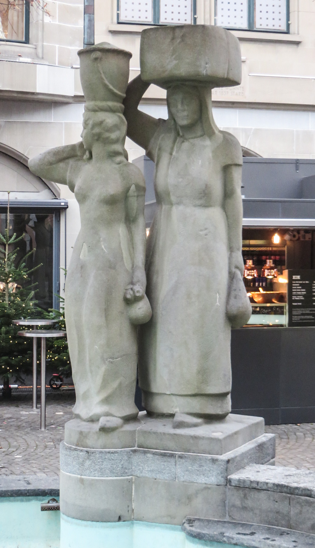 Marktfrauen (1941) , Globusbrunnen, St. Gallen